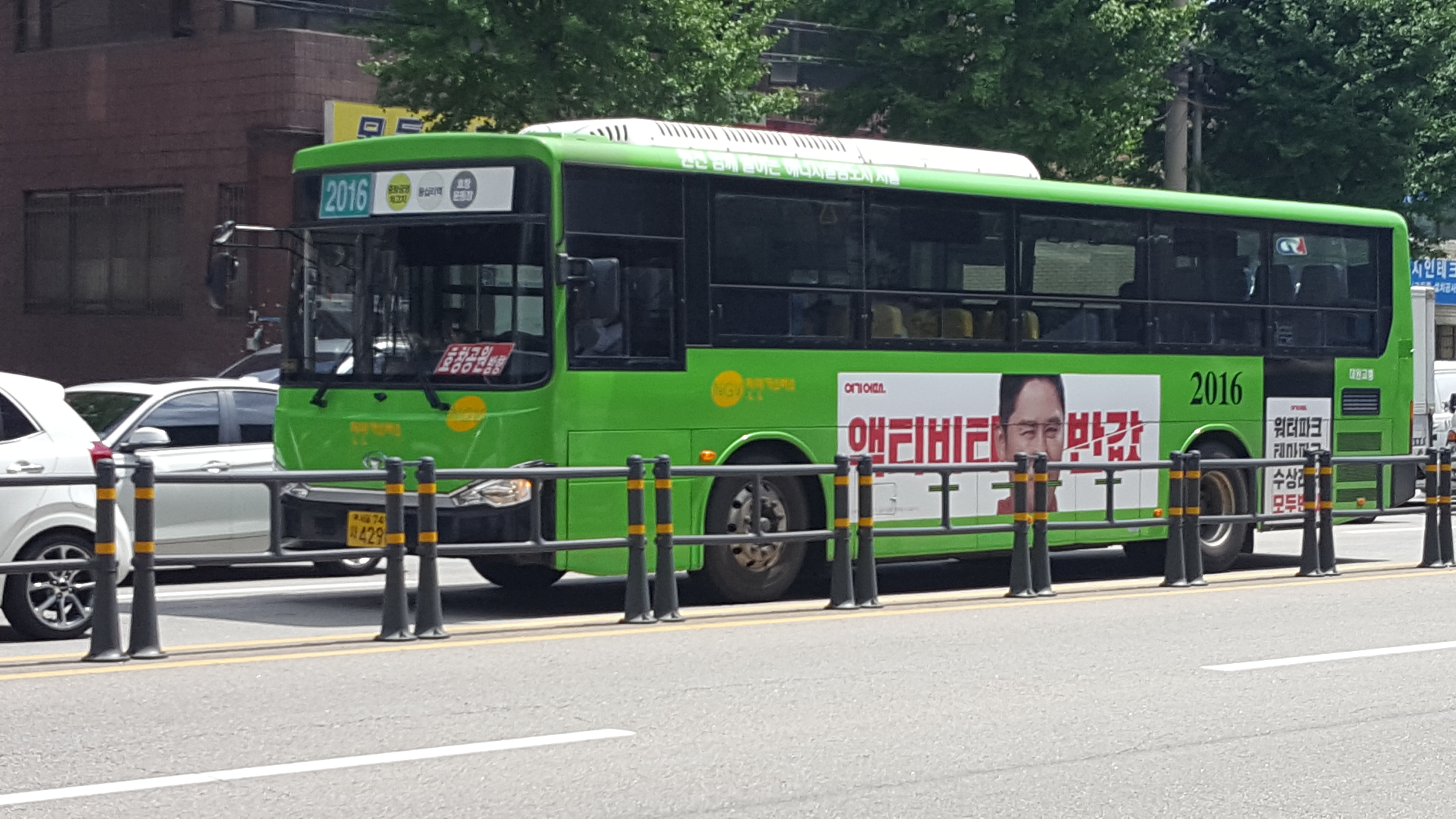 대원교통의 서울 지선버스 2016번